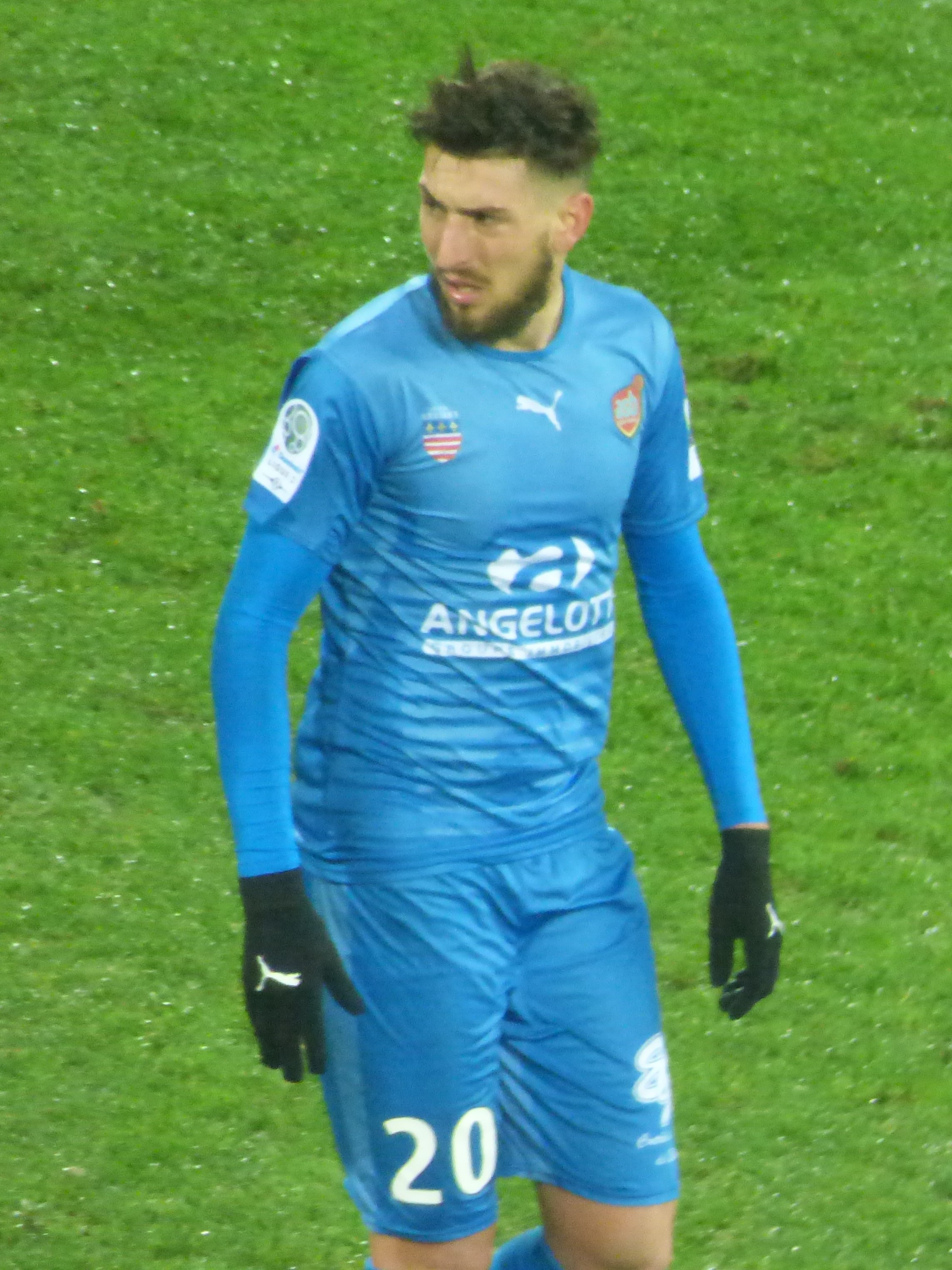 Robin Taillan pendant le match RC Lens / AS Béziers, comptant pour la 23ème journée du championnat de France de football de Ligue 2 2018-2019, le 4 février 2019, au Stade Bollaert-Delelis.